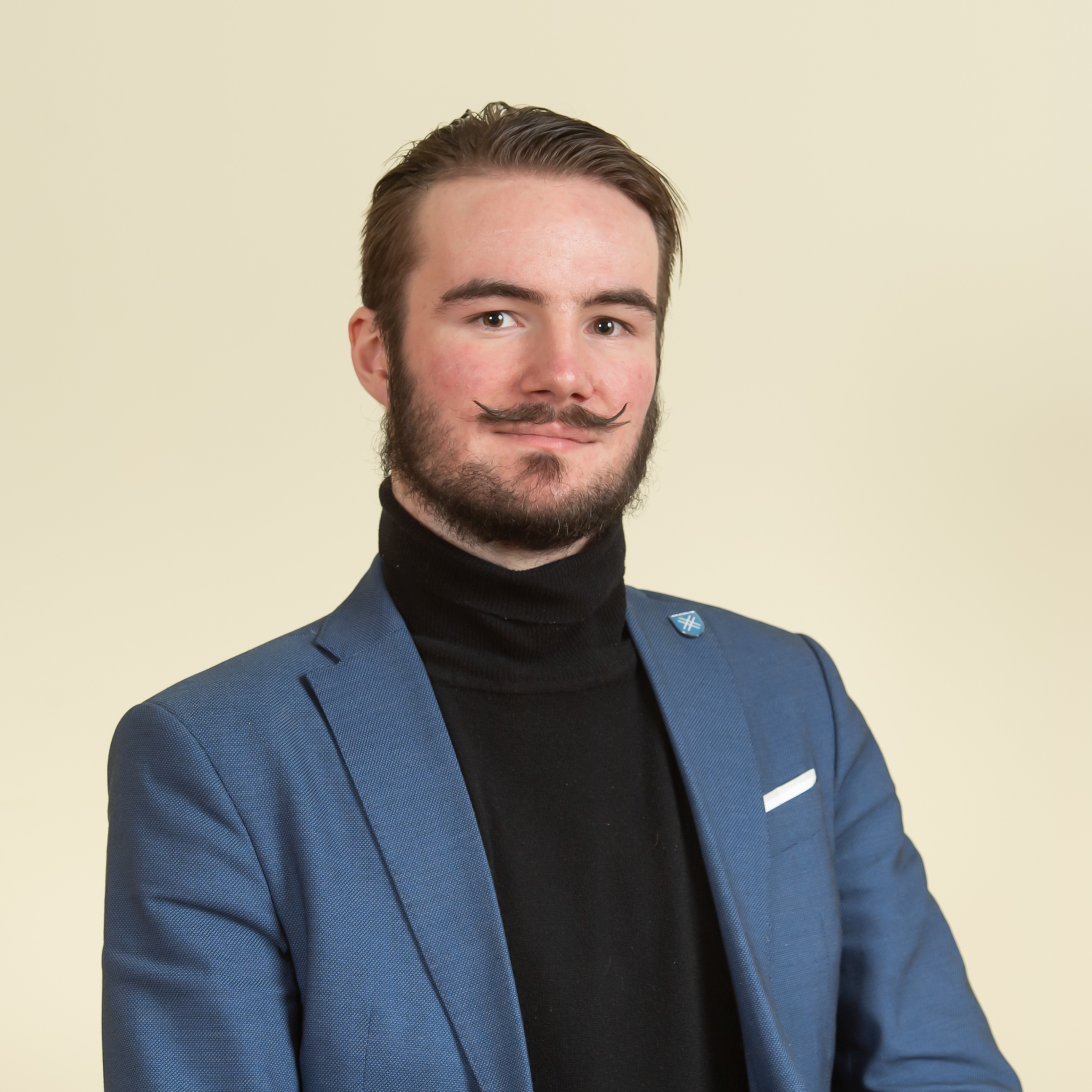 Ruuben Kaalep